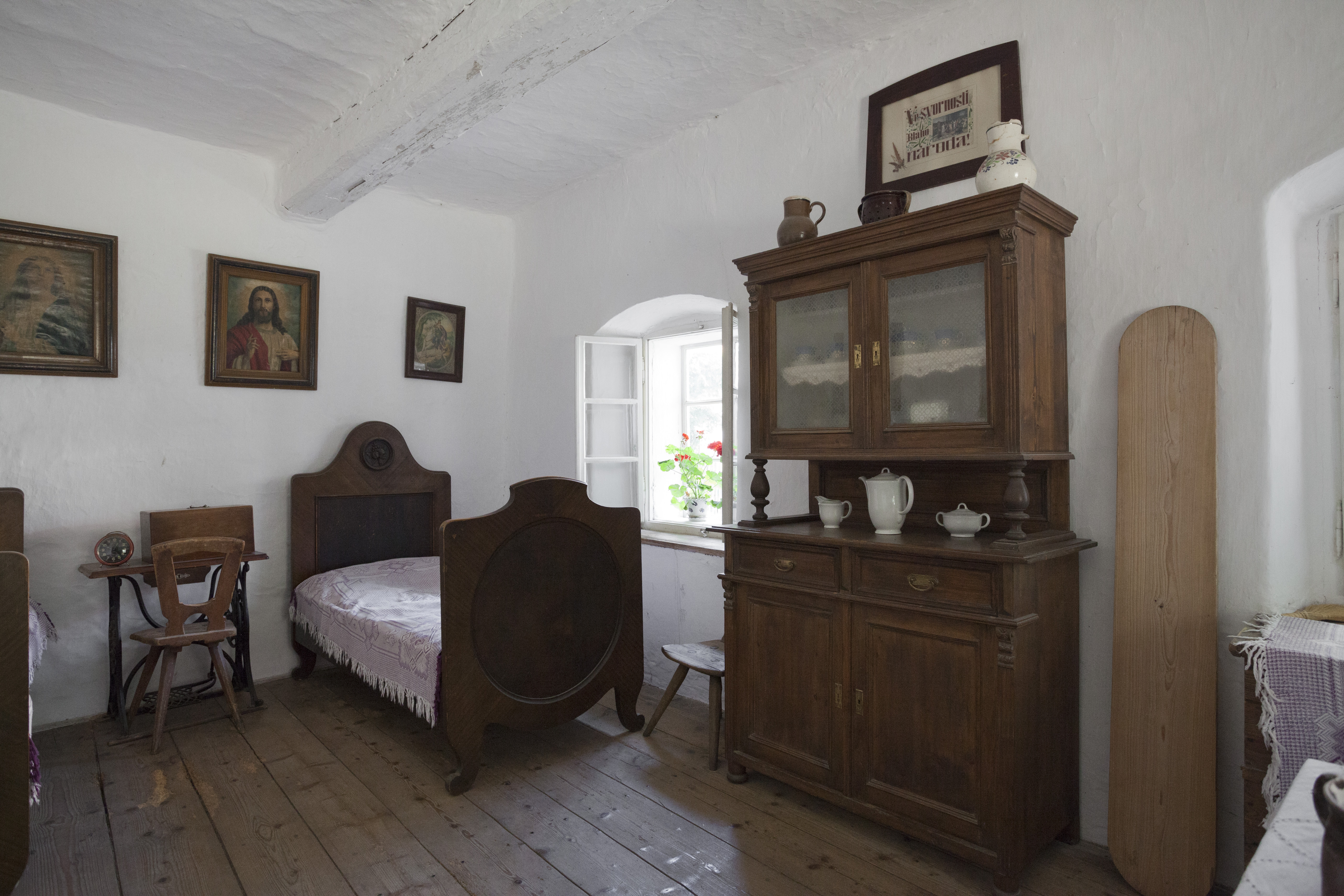 Bývalá rychta U kuchařů (Hamousův statek), Zbečno 22, náměstí, Zbečno.